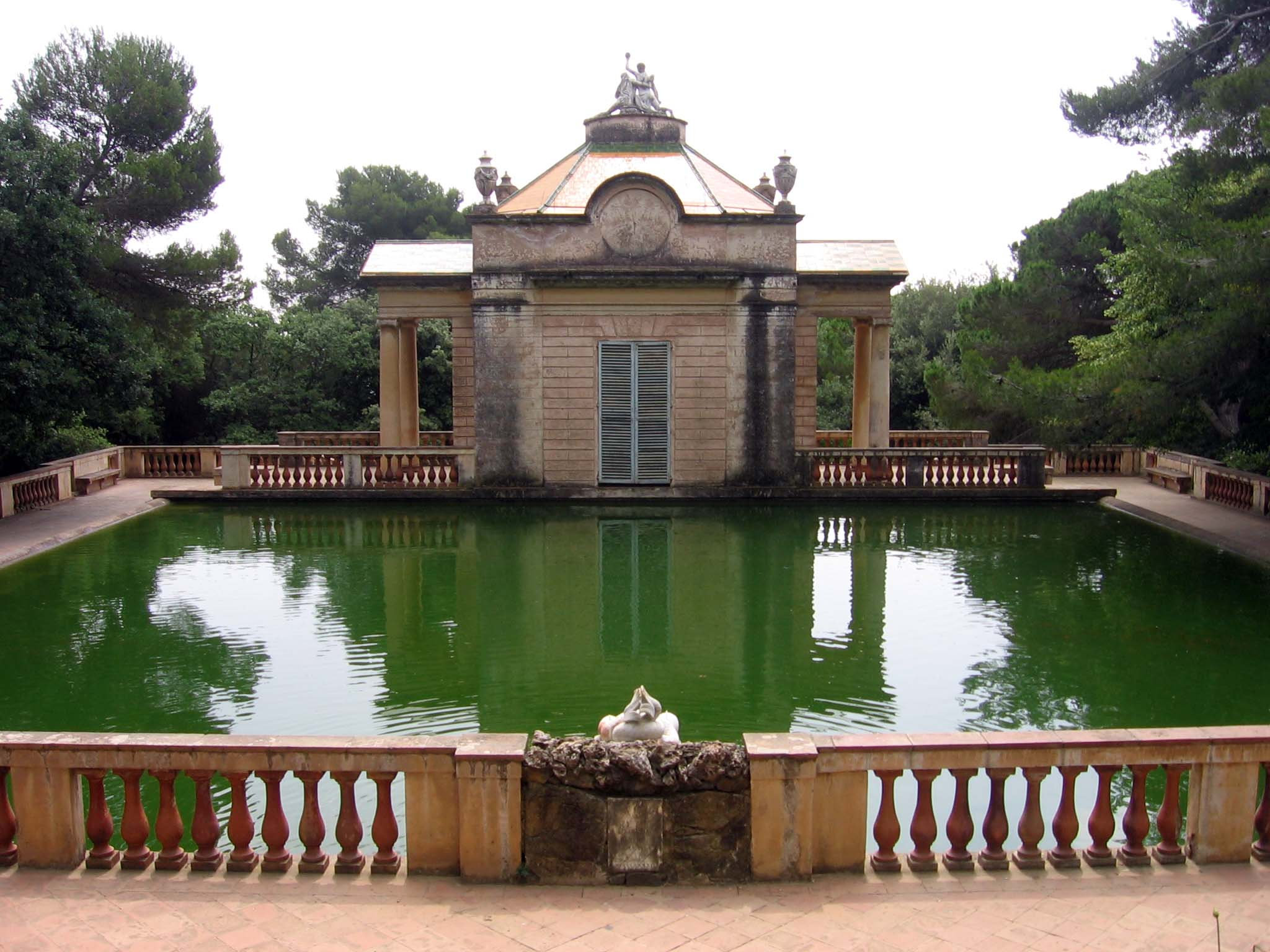 Estanque y pabellón de Carlos IV.